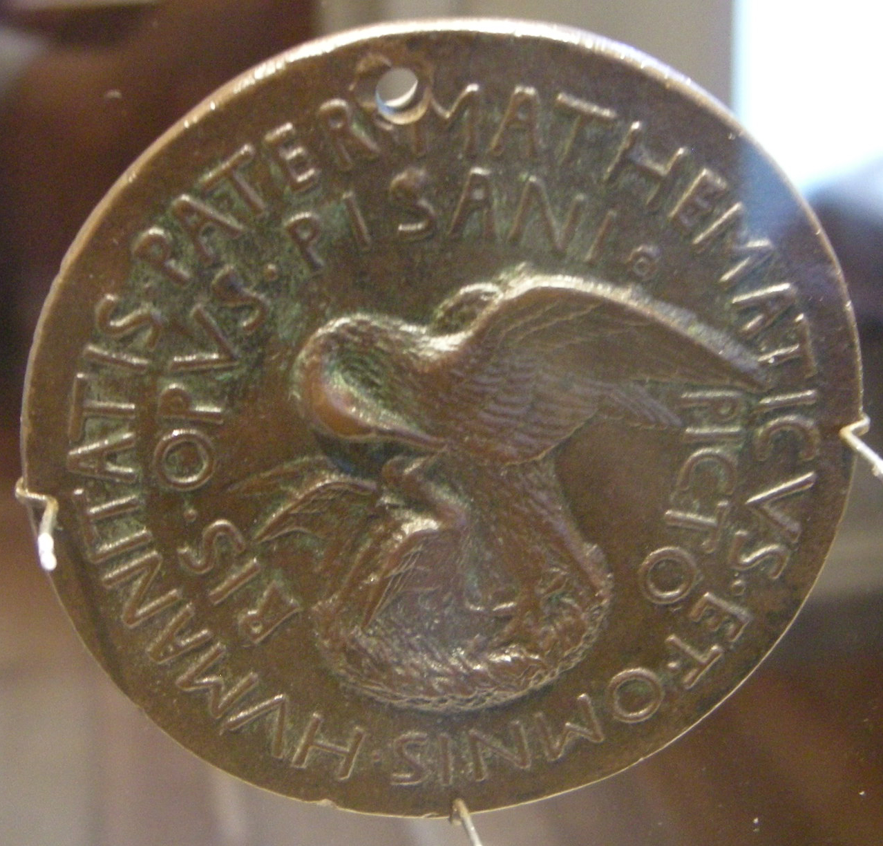 Pisanello, medaglia di vittorino da feltre, verso, 1446 circa